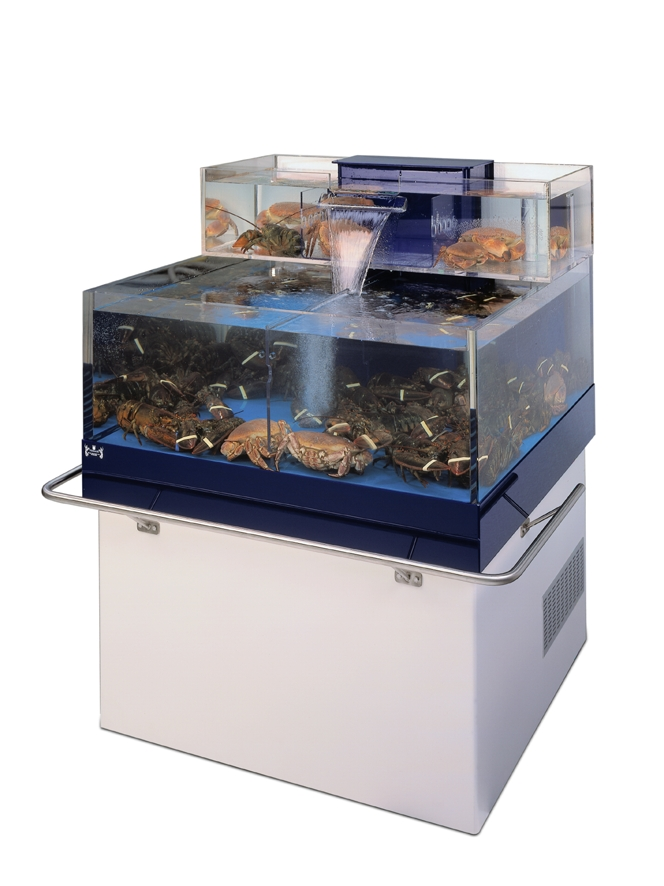 Homarium, leefsysteem voor schaal- en schelpdieren